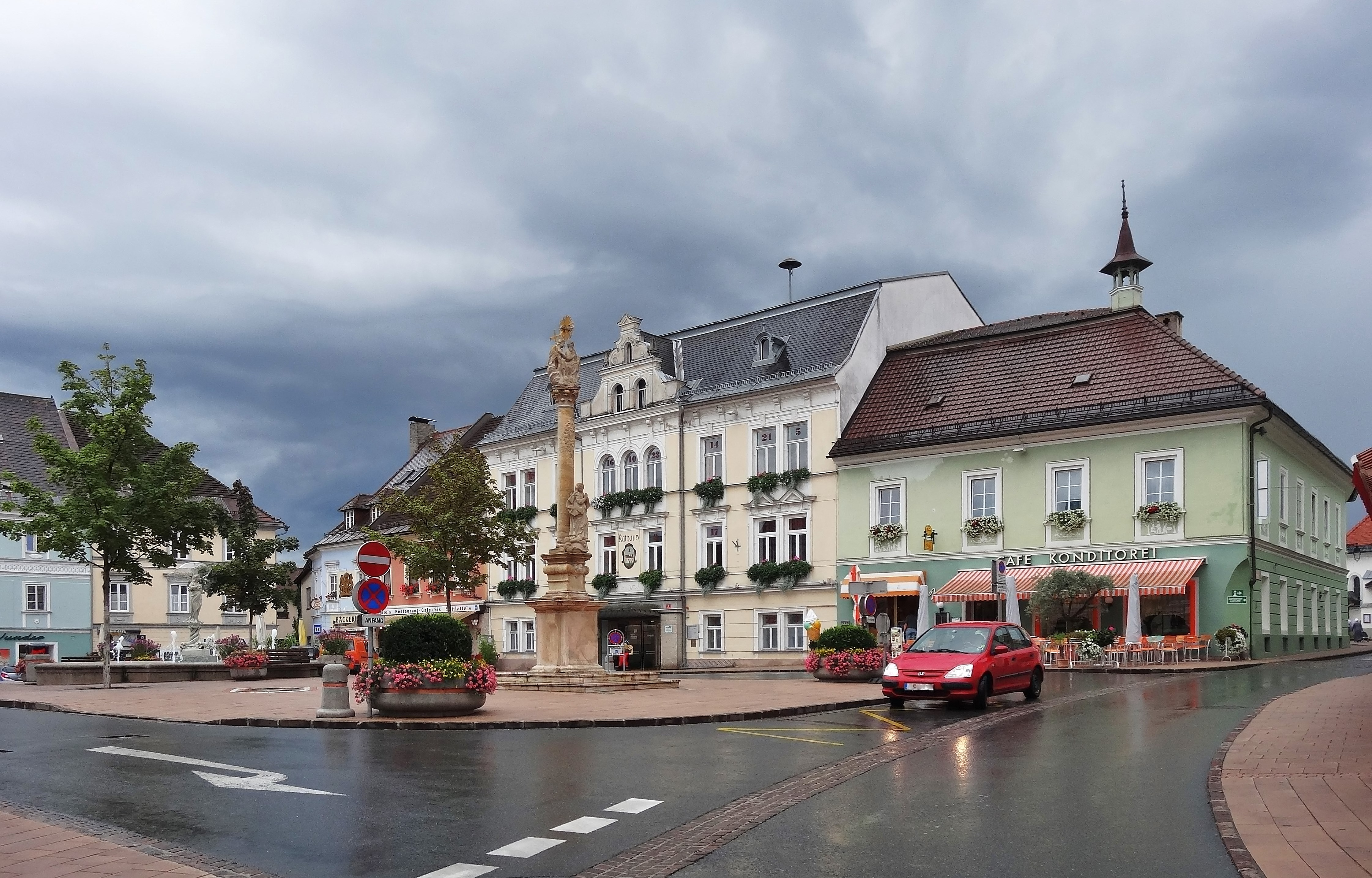 Der Hauptplatz in Feldkirchen in Kärnten, Mariensäule, dahinter das Rathaus.